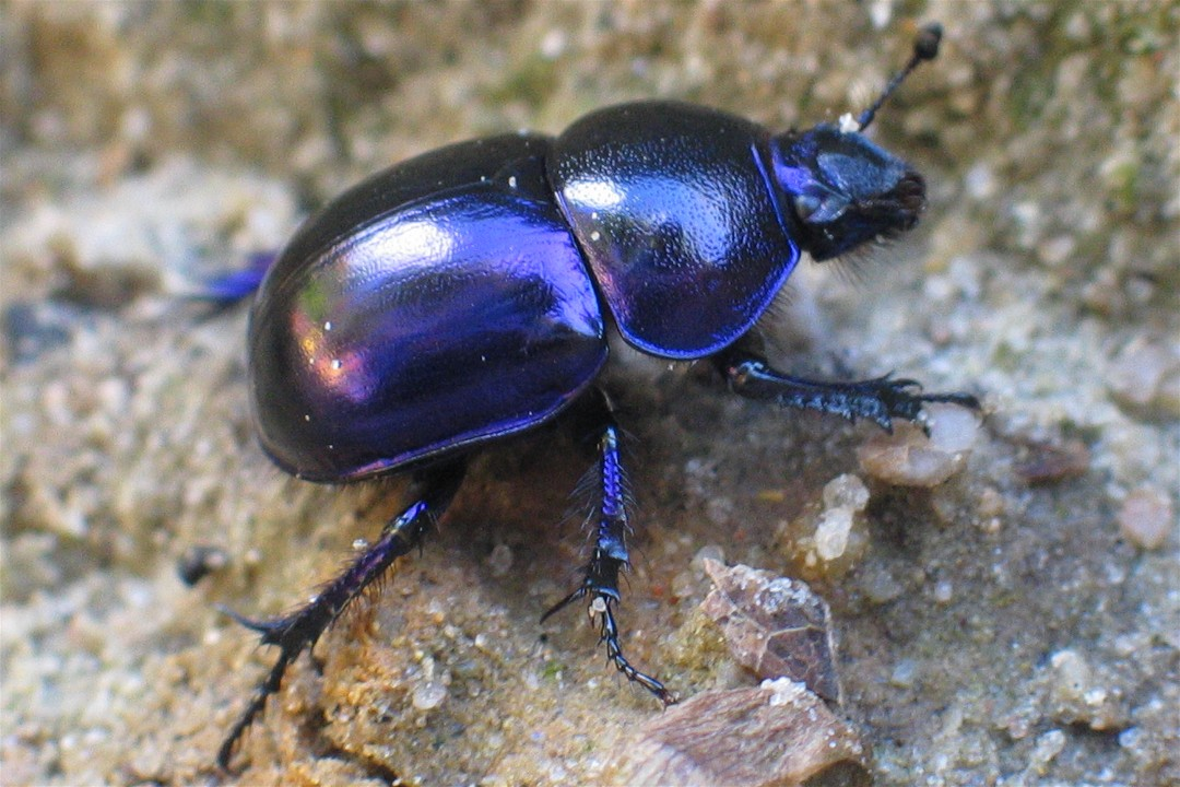 Frühlingsmistkäfer (Geotrupes vernalis)